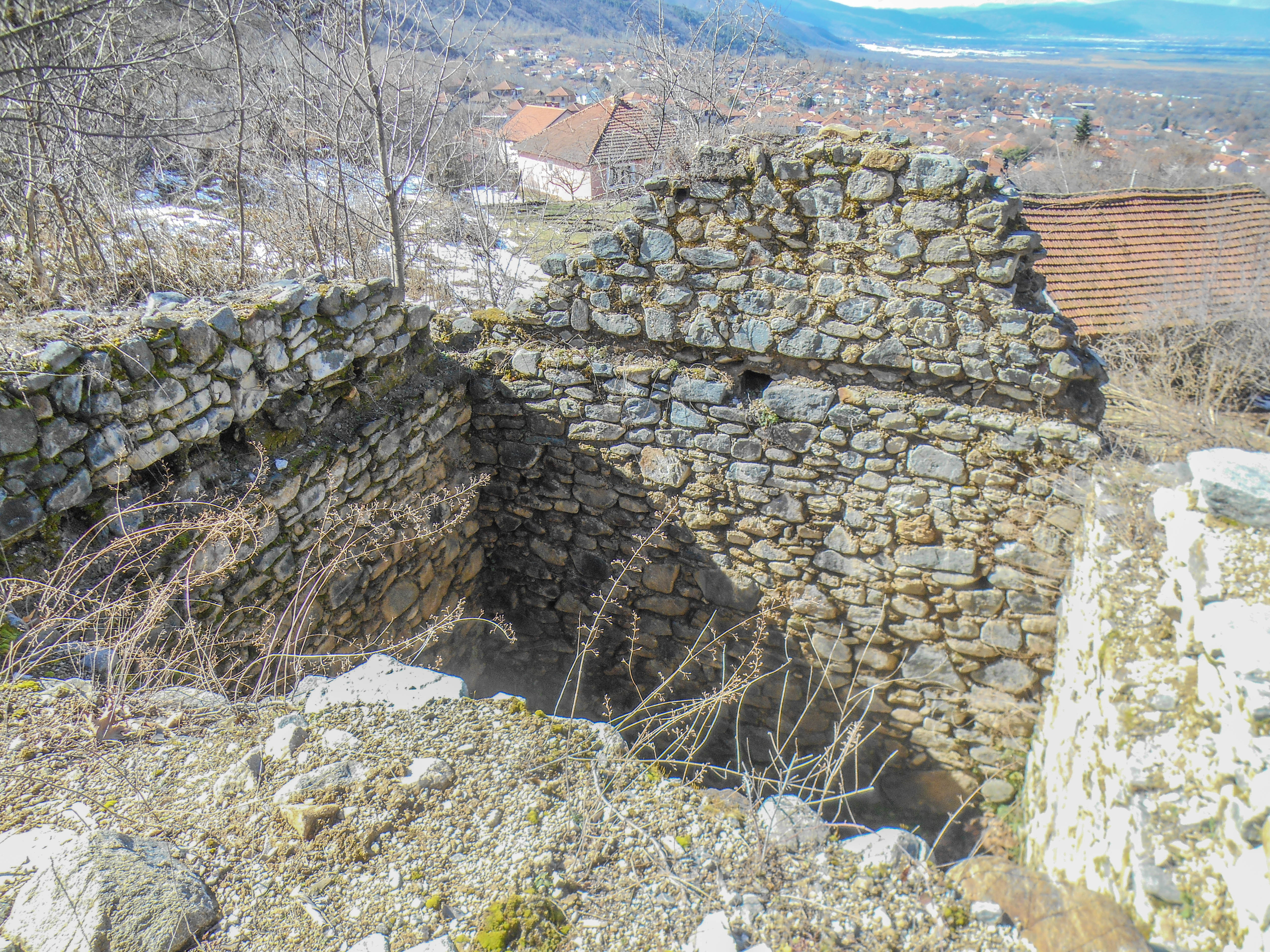 Кула Пирго